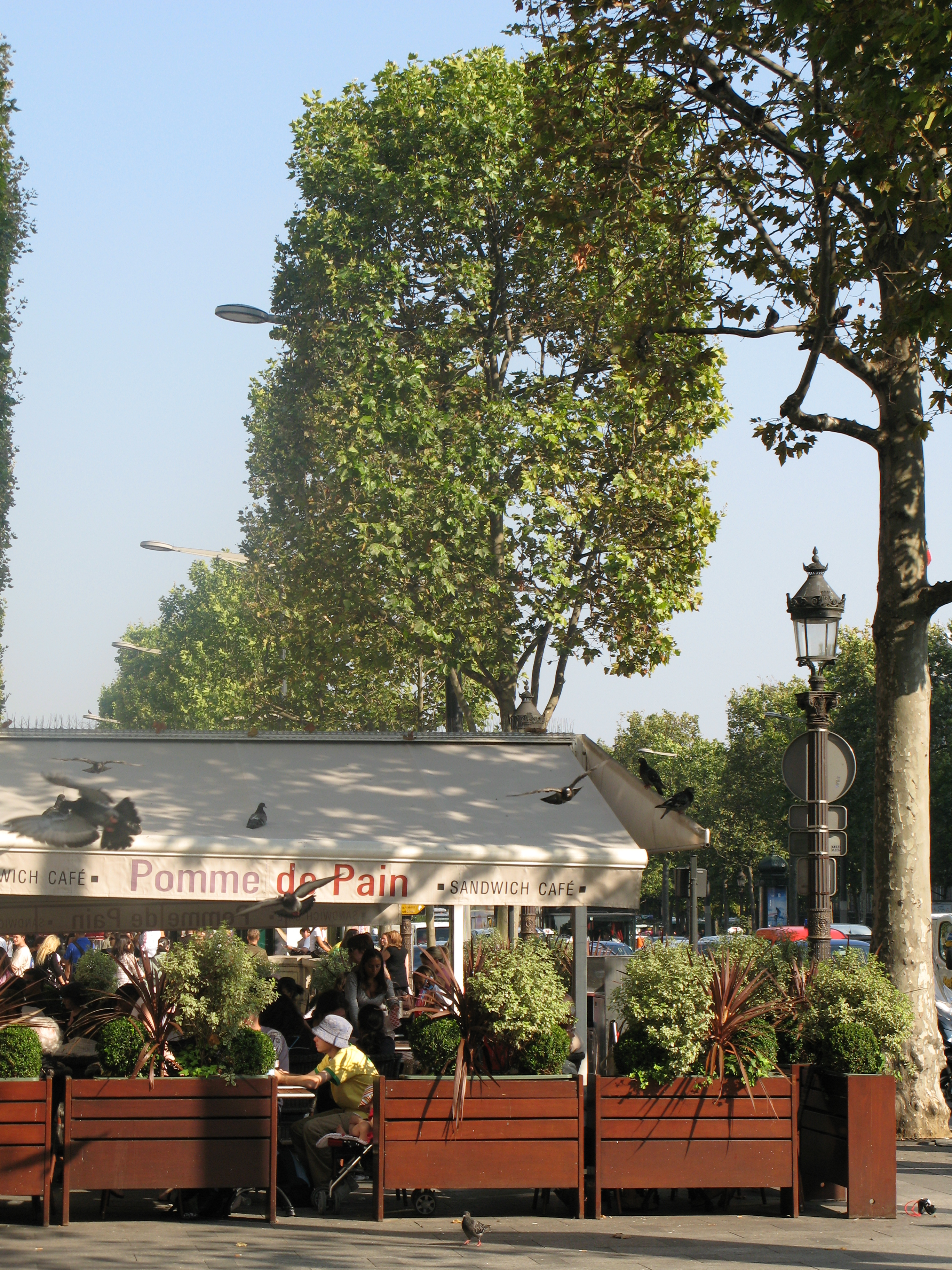 Pomme de Pain, Avenue des Champs-Élysées, Paris.